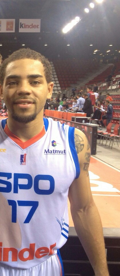 Michael Thompson, SPO Rouen, basket-ball